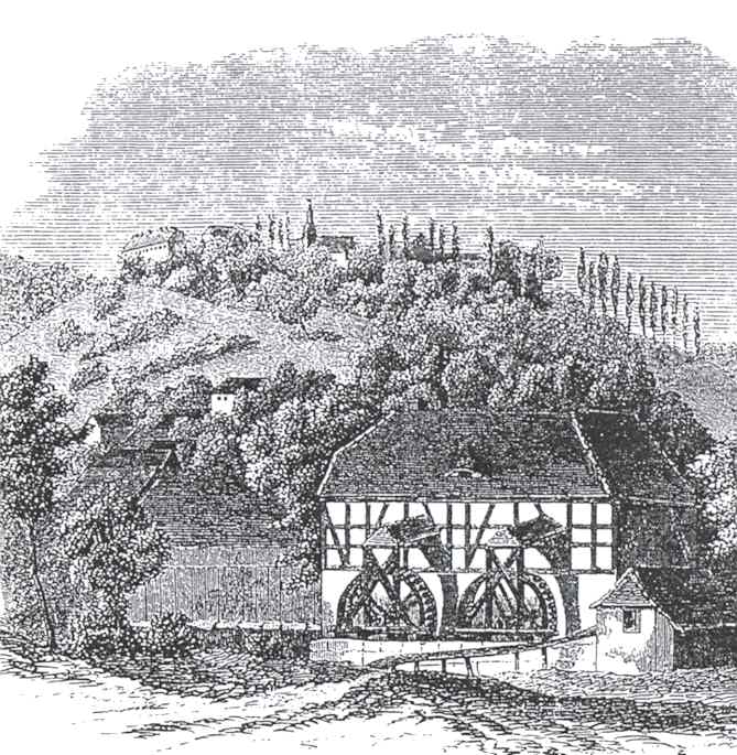 Dorfsulza (mit der Dorfmühle an der Ilm (Saale) und Bergsulza im Hintergrund, beide heute zu Bad Sulza